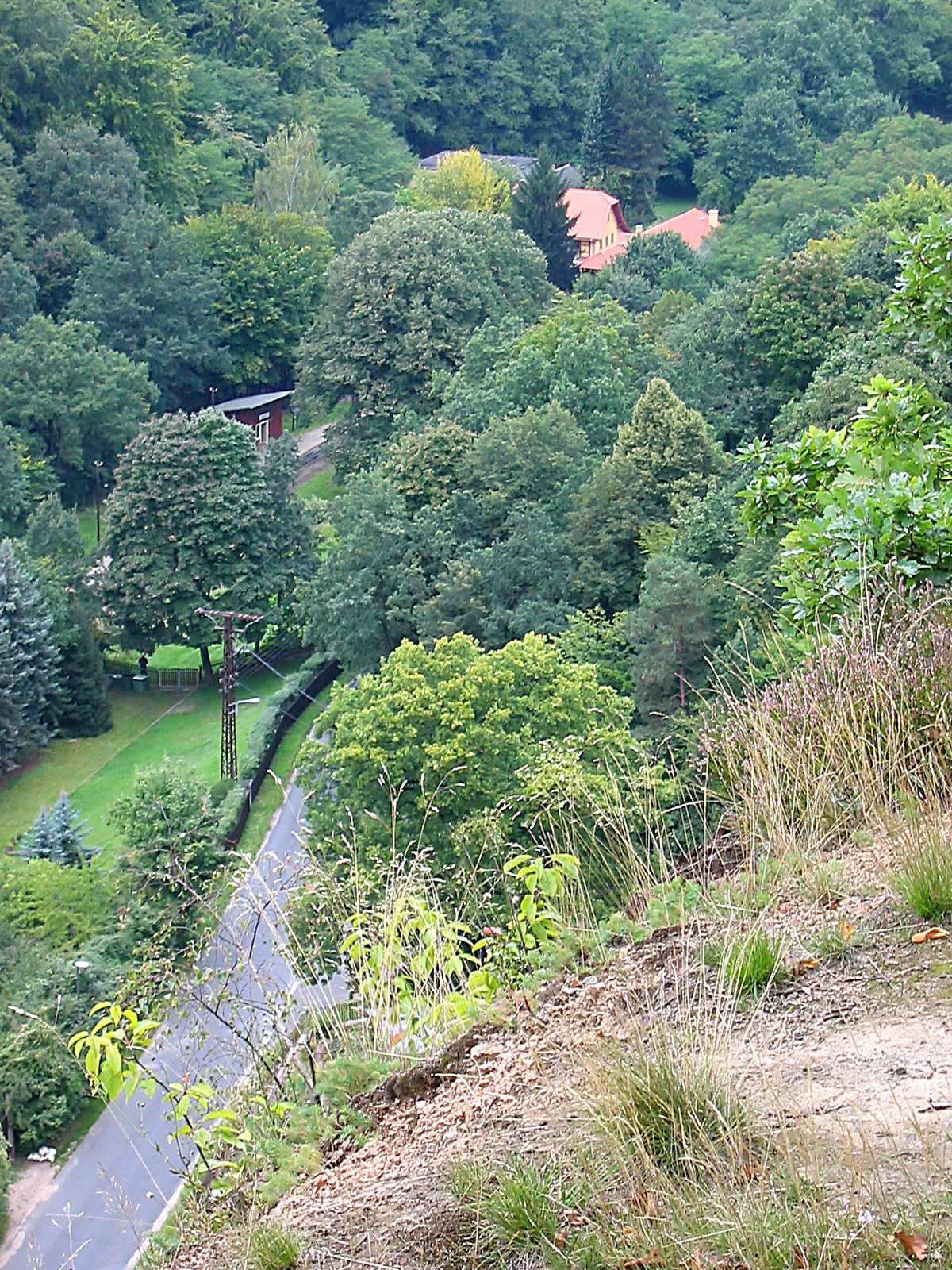 Blick vom Todhübel auf den Haltepunkt Lößnitzgrund, oben die Meierei, Radebeul